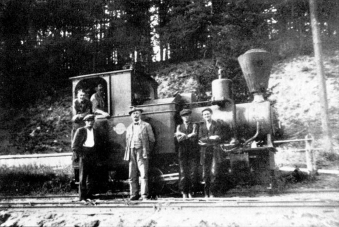 Lokomotive der Waldbahn Rečkov, geliefert von Krauss in Linz (Fabriknummer 5196)